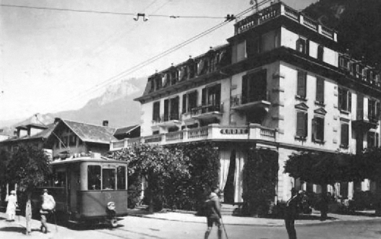 Strassenbahn Motorwagen Ce 2/2 3 der Trambahn Meiringen-Reichenbach-Aareschlucht (MRA) mit Rollenstromabnehmer vor dem Hotel Krone im Meirigen in der Zeit zwischen 1913 und 1929.